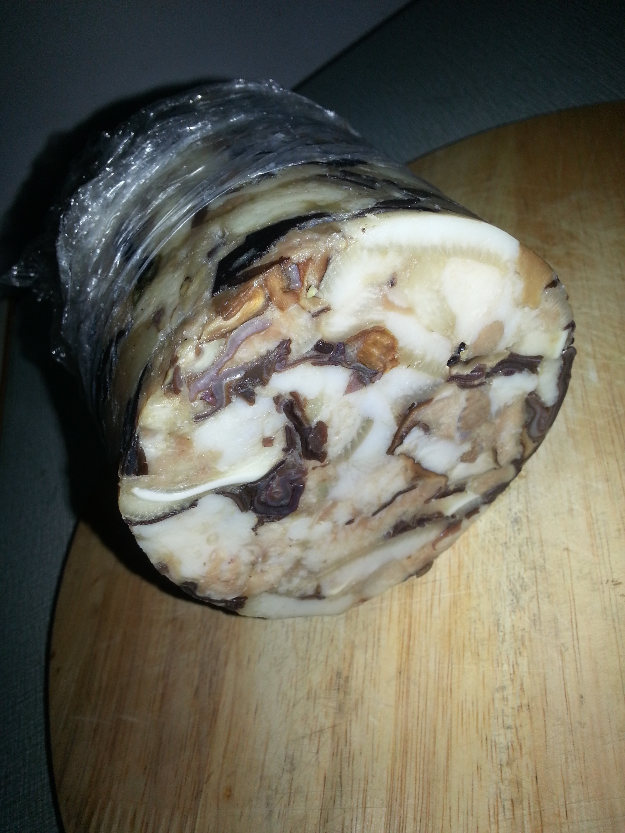 Một khoanh giò thủ sau khi ra khuôn được bọc bằng màng bọc thực phẩm.